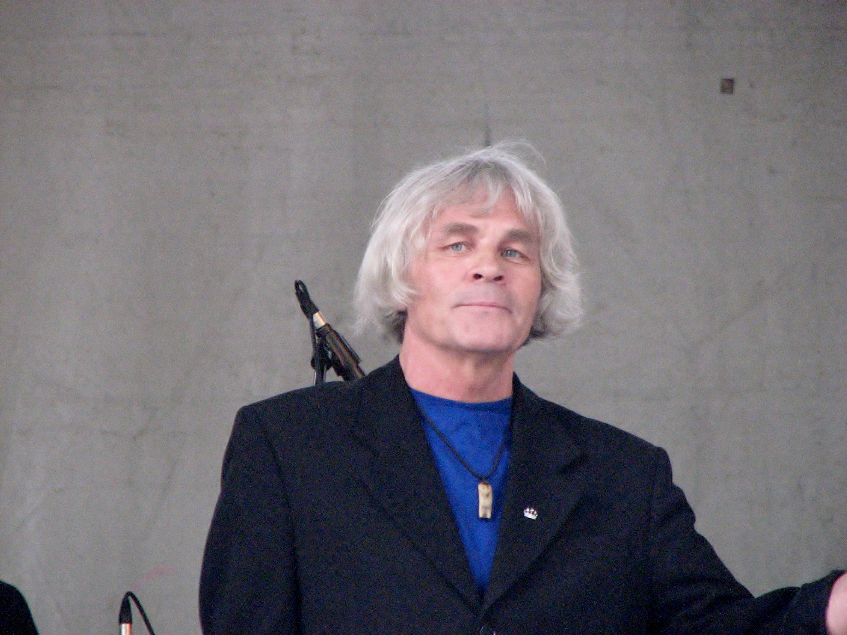 Jüri Aarma esinemas Vaba Rahva Laulul Kuressaare lossihoovis